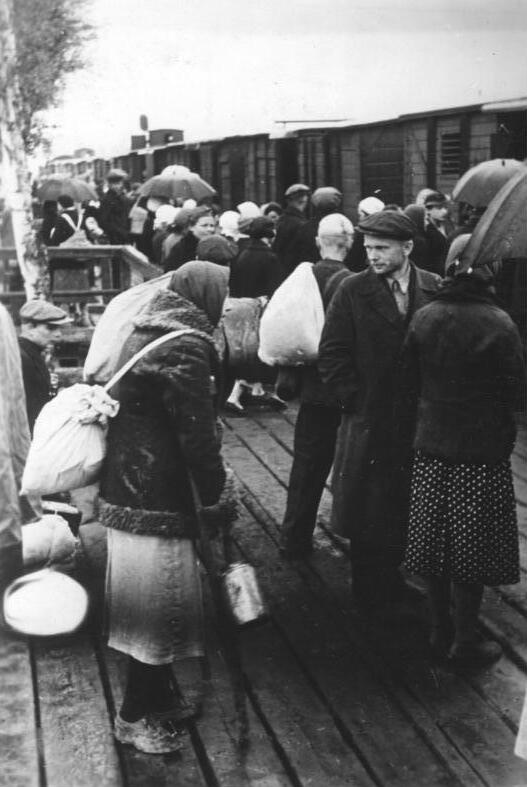 Eisenbahntransport russischer Zwangsarbeiter ADN-ZB/Archiv, II. Weltkrieg 1939-45 Aus den von den faschistischen deutschen Truppen okkupierten Gebieten der Sowjetunion werden Tausende arbeitsfähige Menschen als billige Arbeitskräfte zur Zwangsarbeit nach Deutschland deportiert, Juni 1942. Aufnahme: Rabenberger 3574-42 Scherl, An der Sowjetfront: Wieder fährt ein Zug mit freiwilligen Arbeitern und Arbeiterinnen aus den besetzten gebieten der Sowjetunion ins reich. Sie haben sich für die Landwirtzschaft uns - soweit sie Facharbeiter sind - für die deutsche Industrie dienstverpflichtet. Kriegsberichter Rabenberger, Juni 42 3574-42